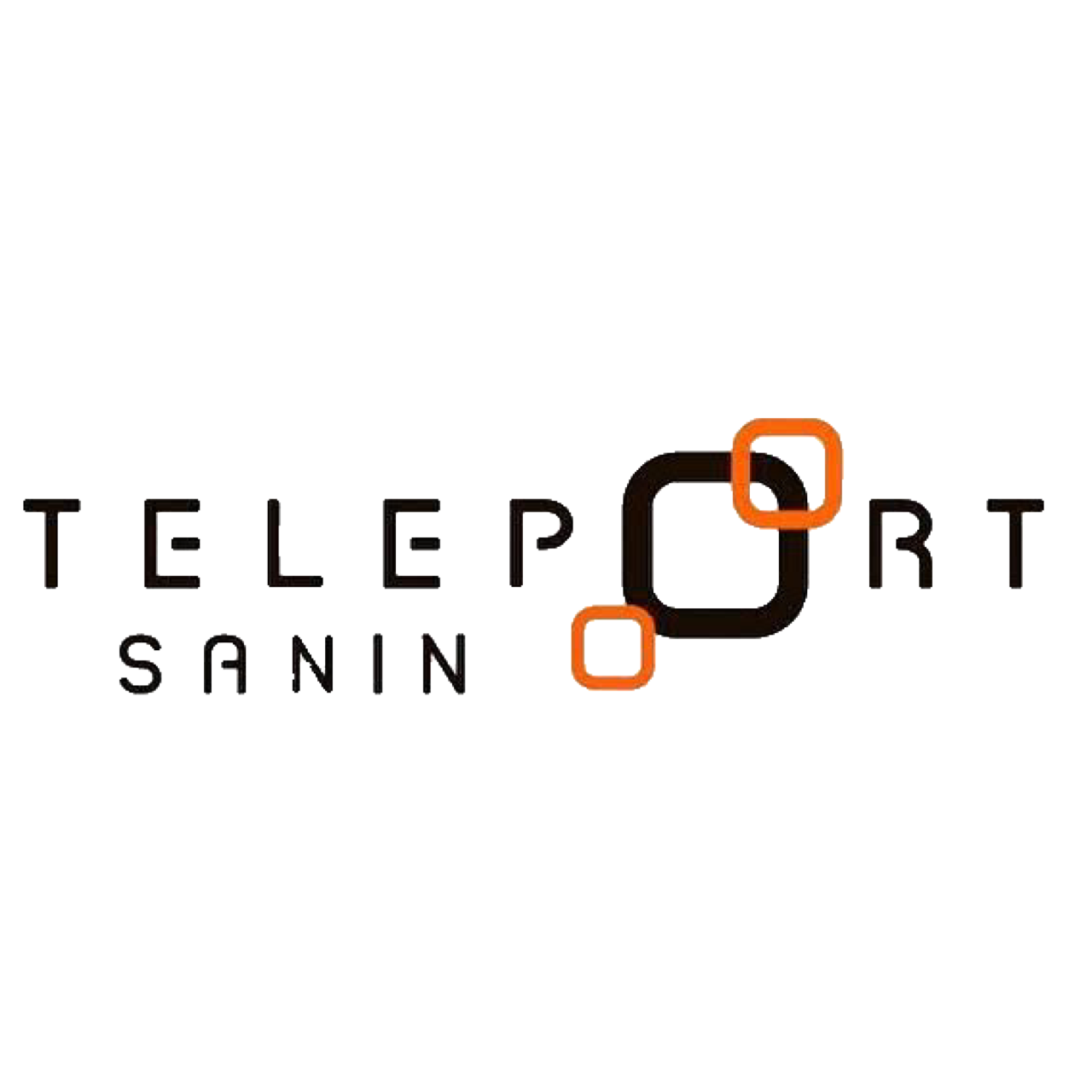 テレポート山陰 ロゴマーク